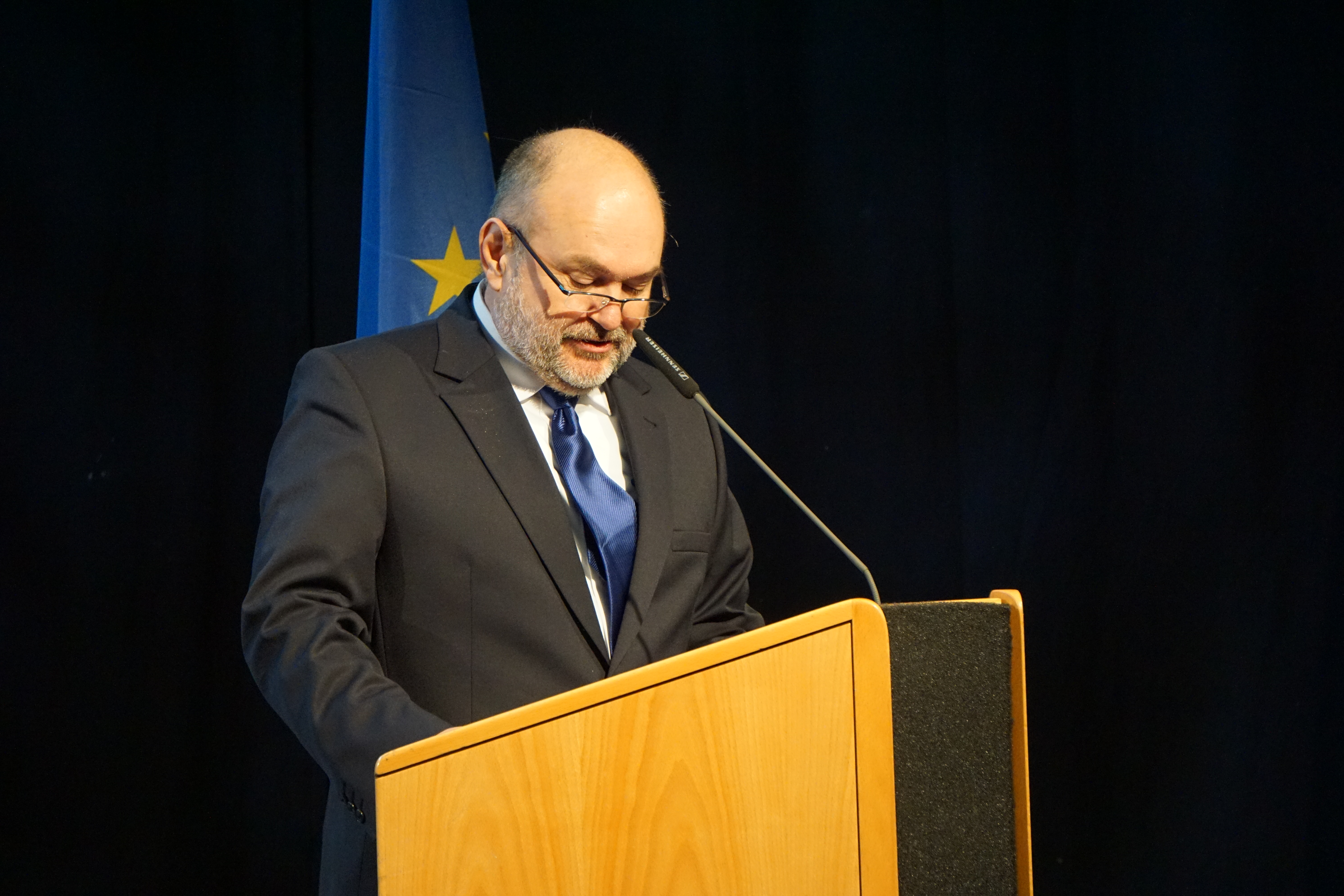 Cérémonie d'inauguration de la ligne de tramway à Luxembourg le 10 décembre 2017. Discours par André Von der Marck, Directeur général de LuxTram.